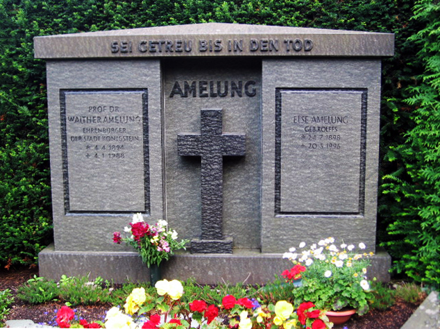 Das Grab Prof. Dr. Walther Amelungs und seiner Gemahlin Else (geb. Rolffs * 24.07.1898, † 20.05.1996), auf dem städischen Friedhof in Königstein im Taunus